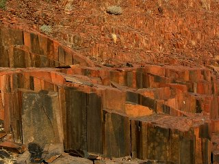 Photo personnelle, Sill de dolérite, Valley of the organ pipes, Namibie, juillet 2006